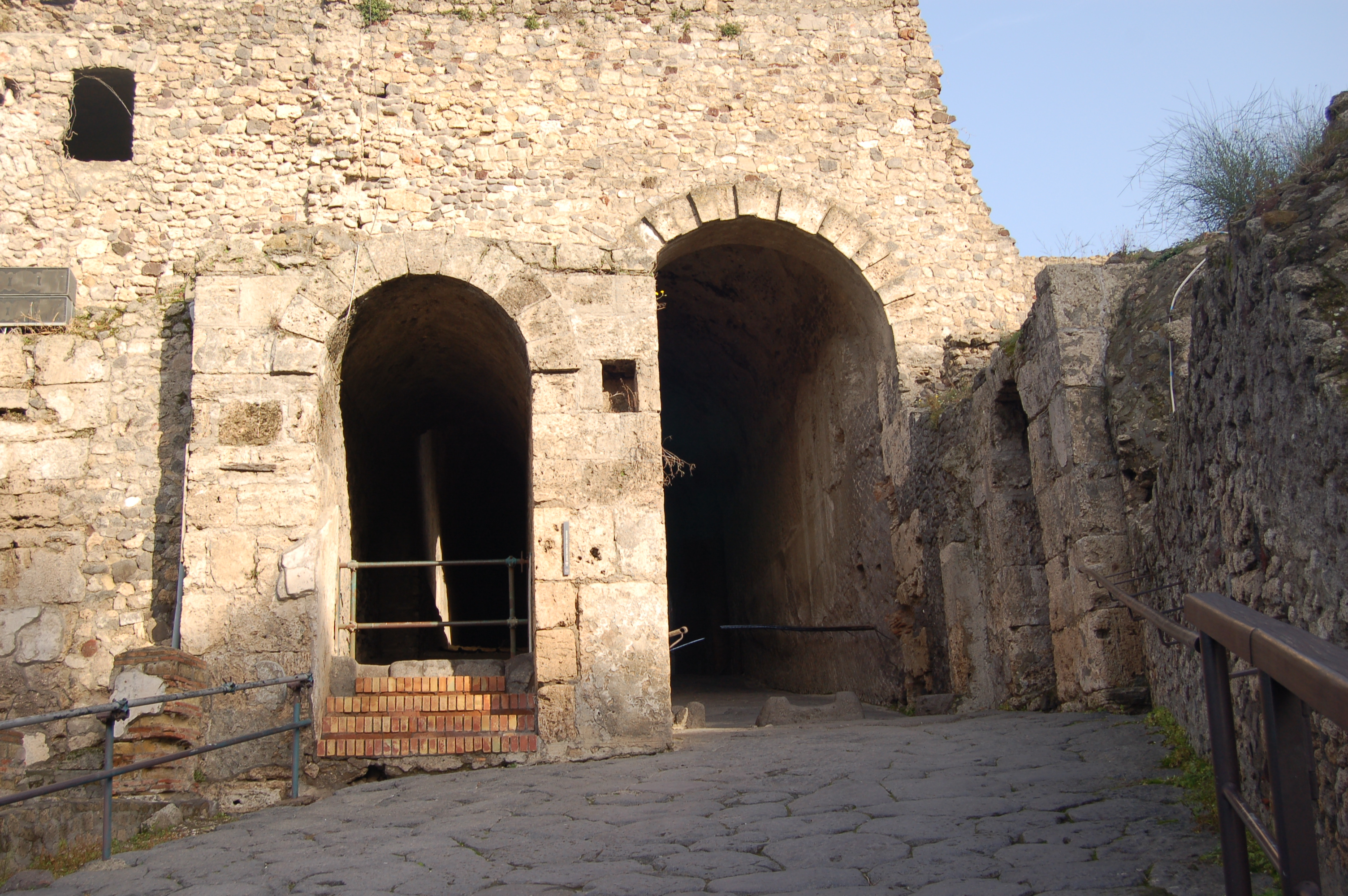 Puerta Marina Pompeya